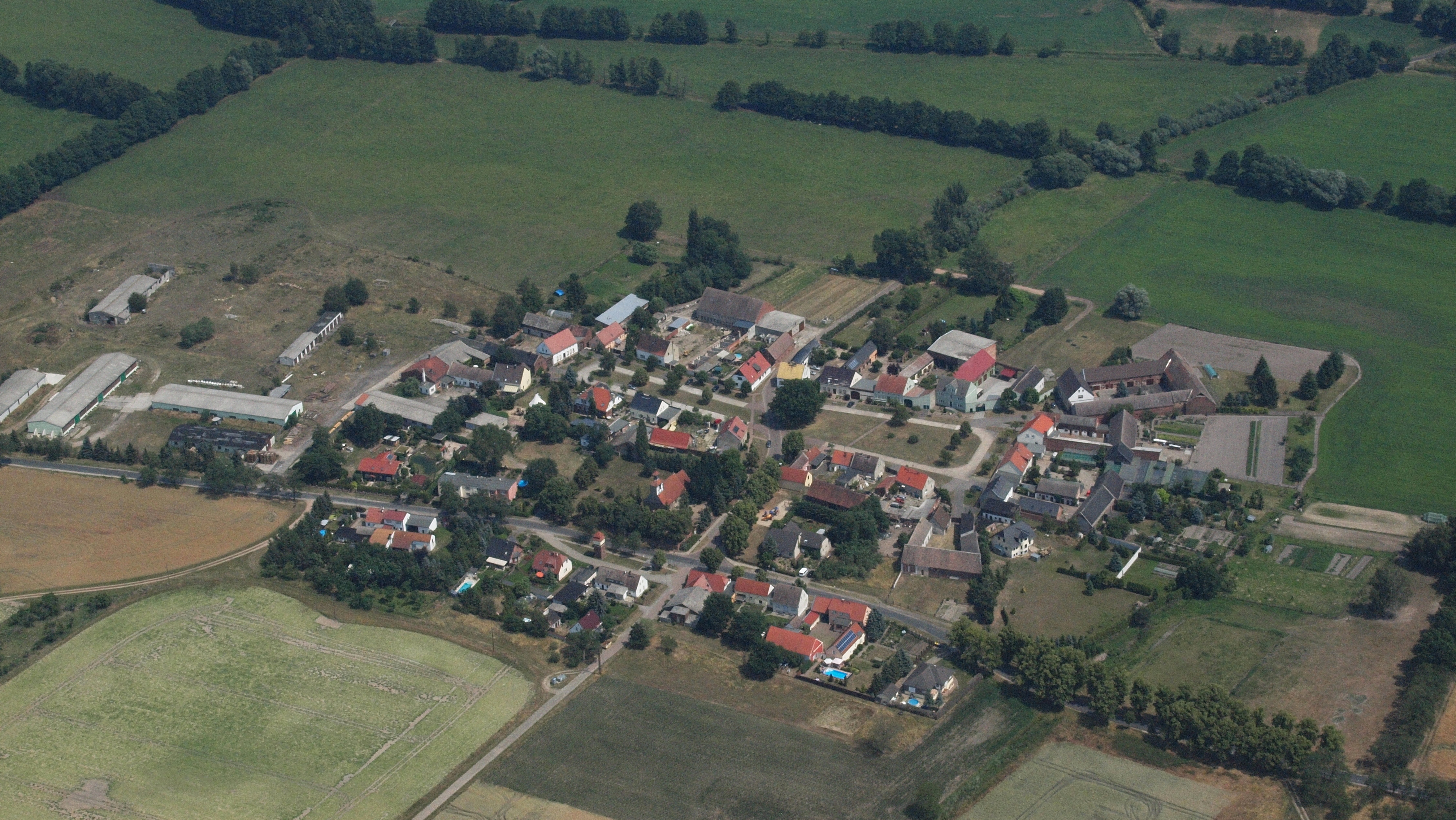 Strinum, Luftaufnahme (2015)